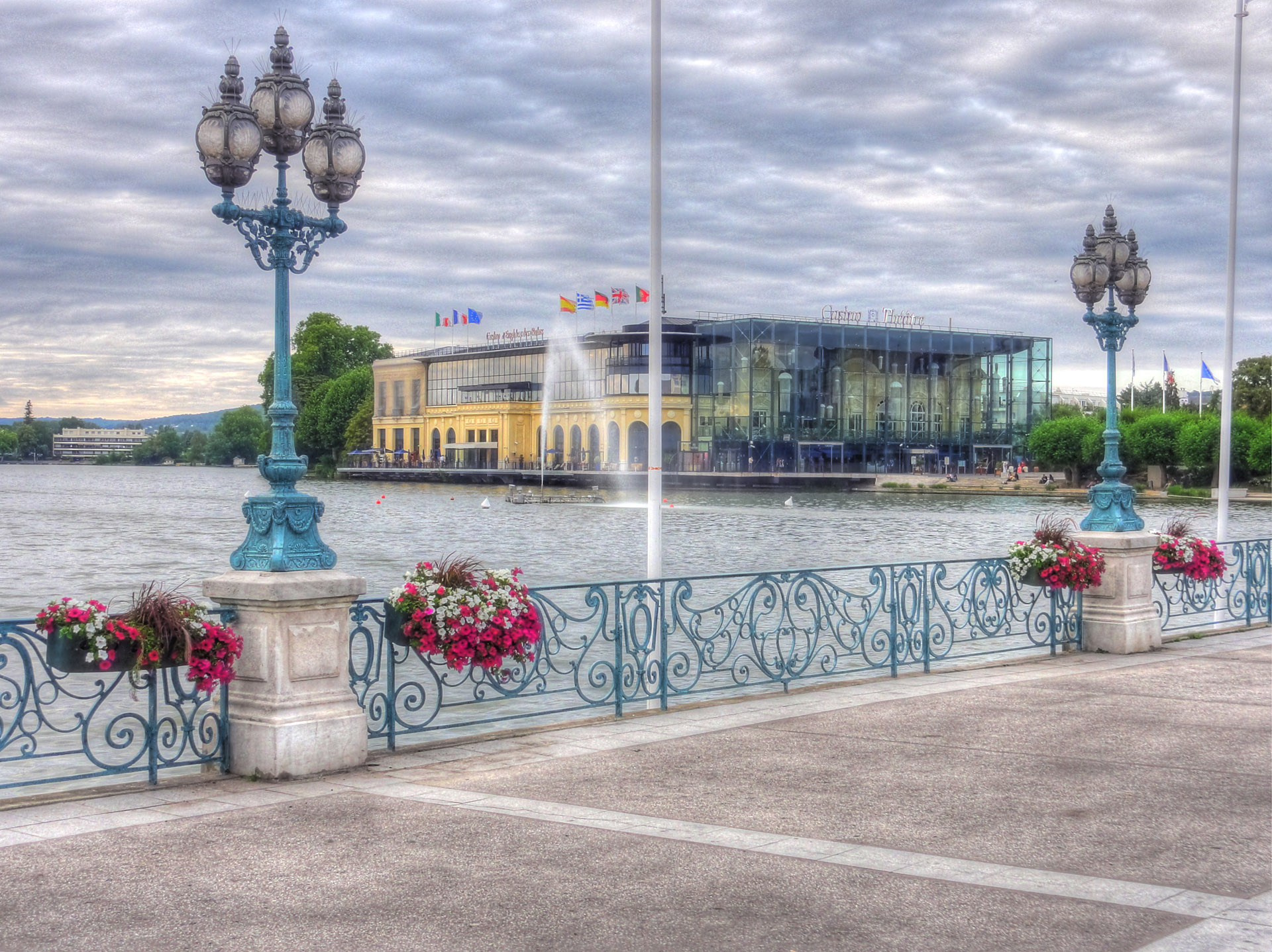 La jetée du lac et le casino d'Enghien, Val-d'Oise, France. Photo HDR.